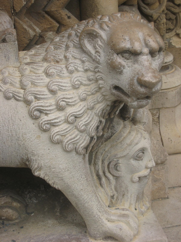 Cerkev sv. Jurija, Ják, Madžarska; lev na levi strani glavnega vhoda.